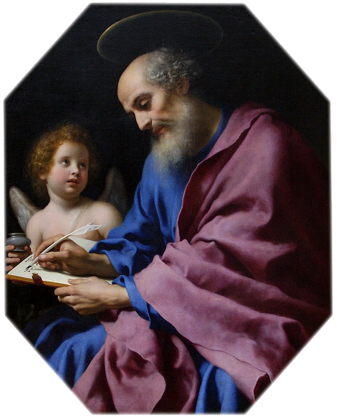 San Matteo e l'angelo, o/tl, 135 x 110 cm, P. Getty M., Malibu